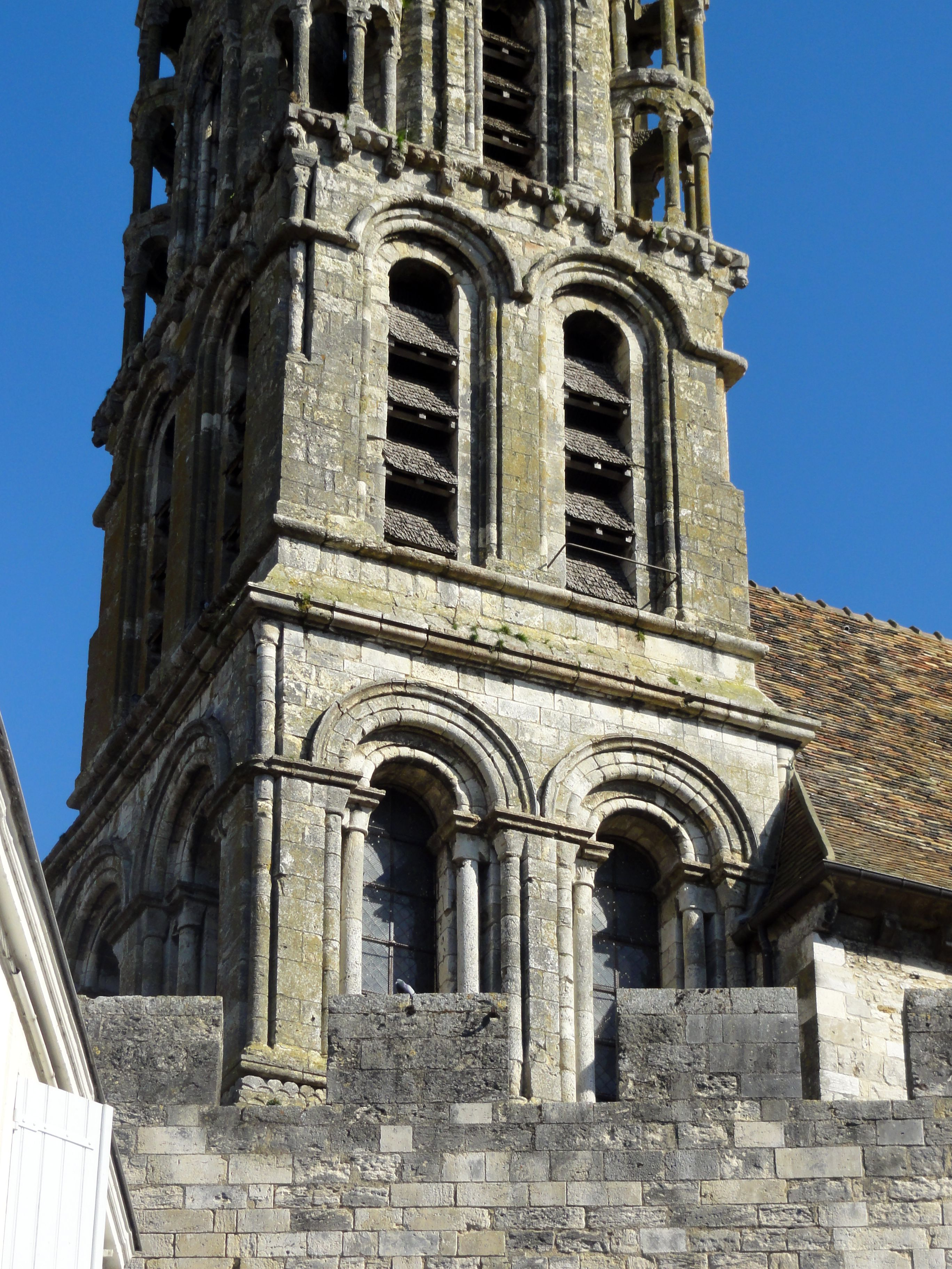 Clocher.